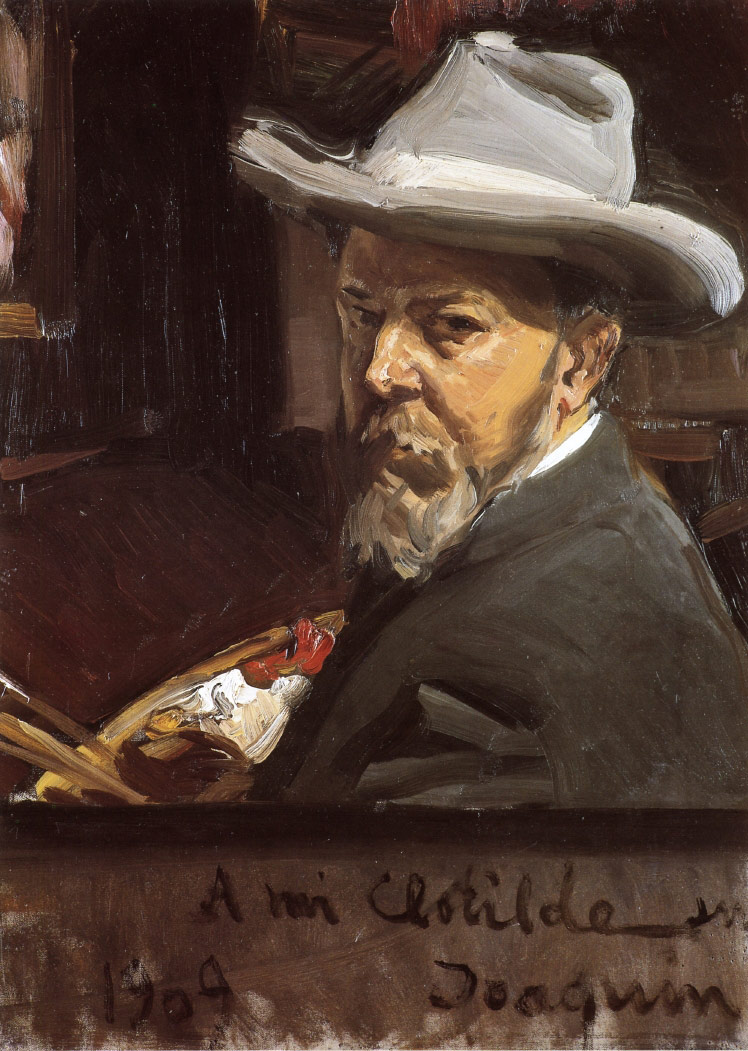 Self-portrait (1909)